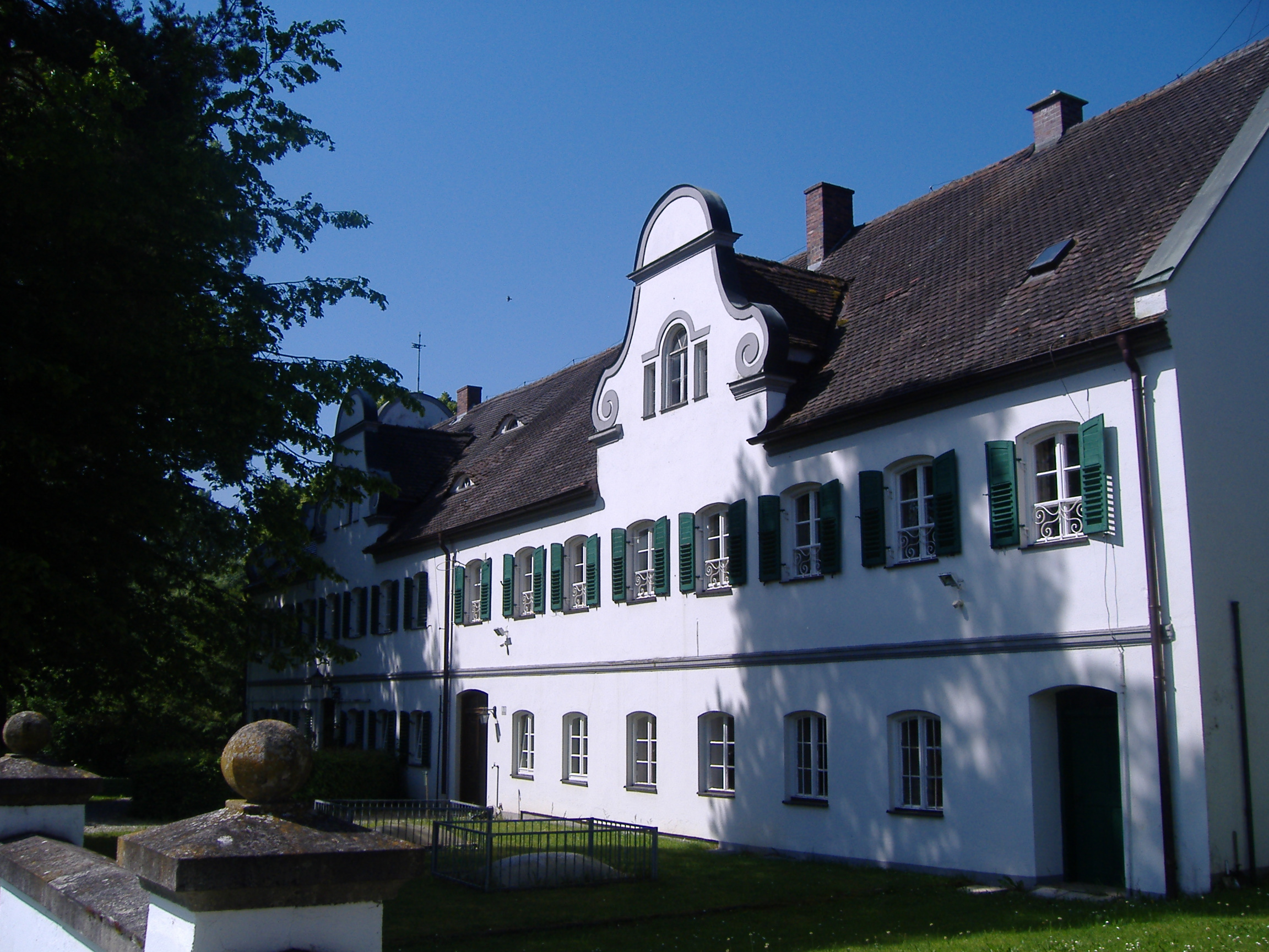 altes Schloss Gut Hermeten